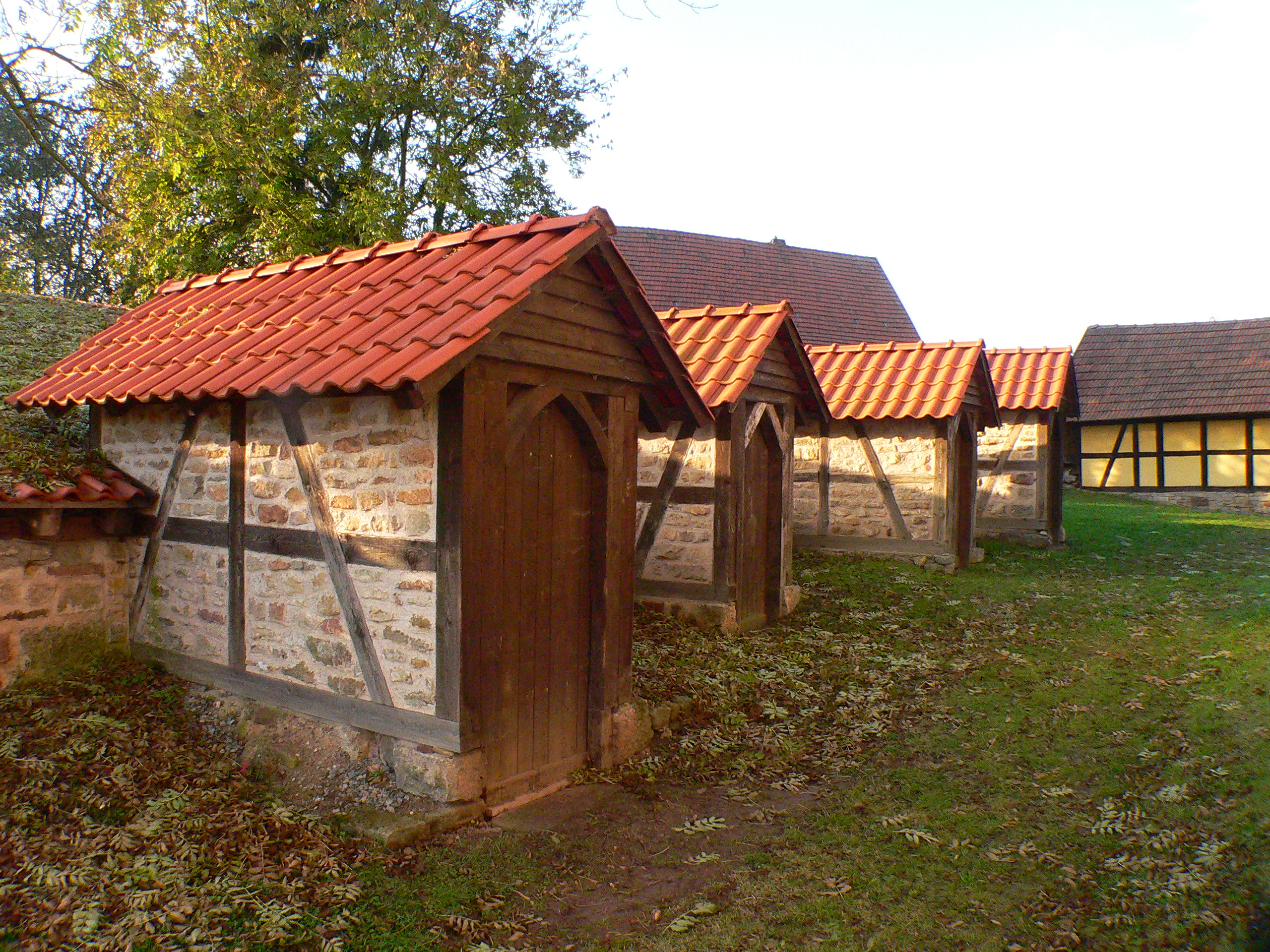 Kirchhof St. Johann in Herpf (Thüringen), Vorratshäuser 15./16. Jh. (sog. "Gaden")